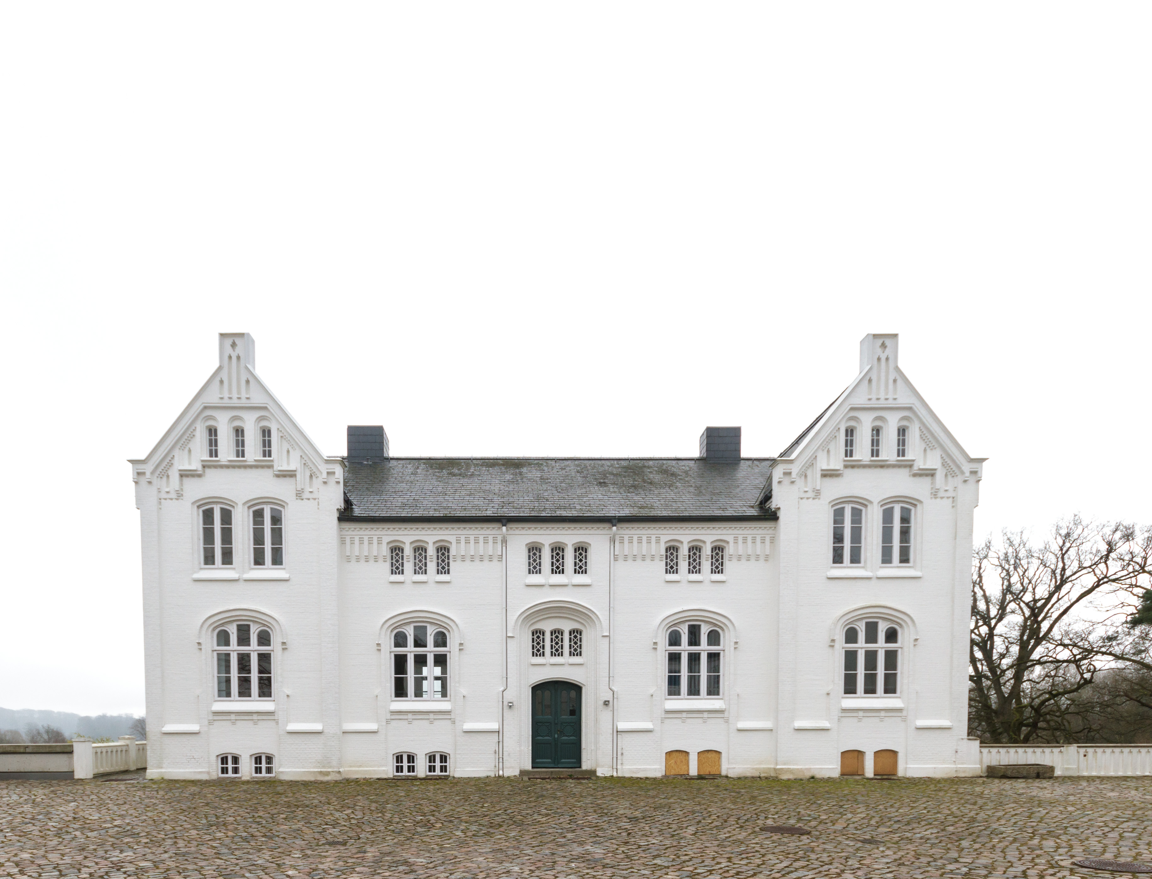 Blomenburg